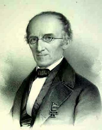 Porträt des Geologen Karl Georg von Raumer